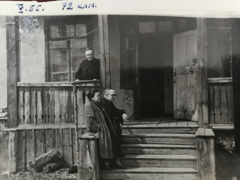 Жизни в ссылке